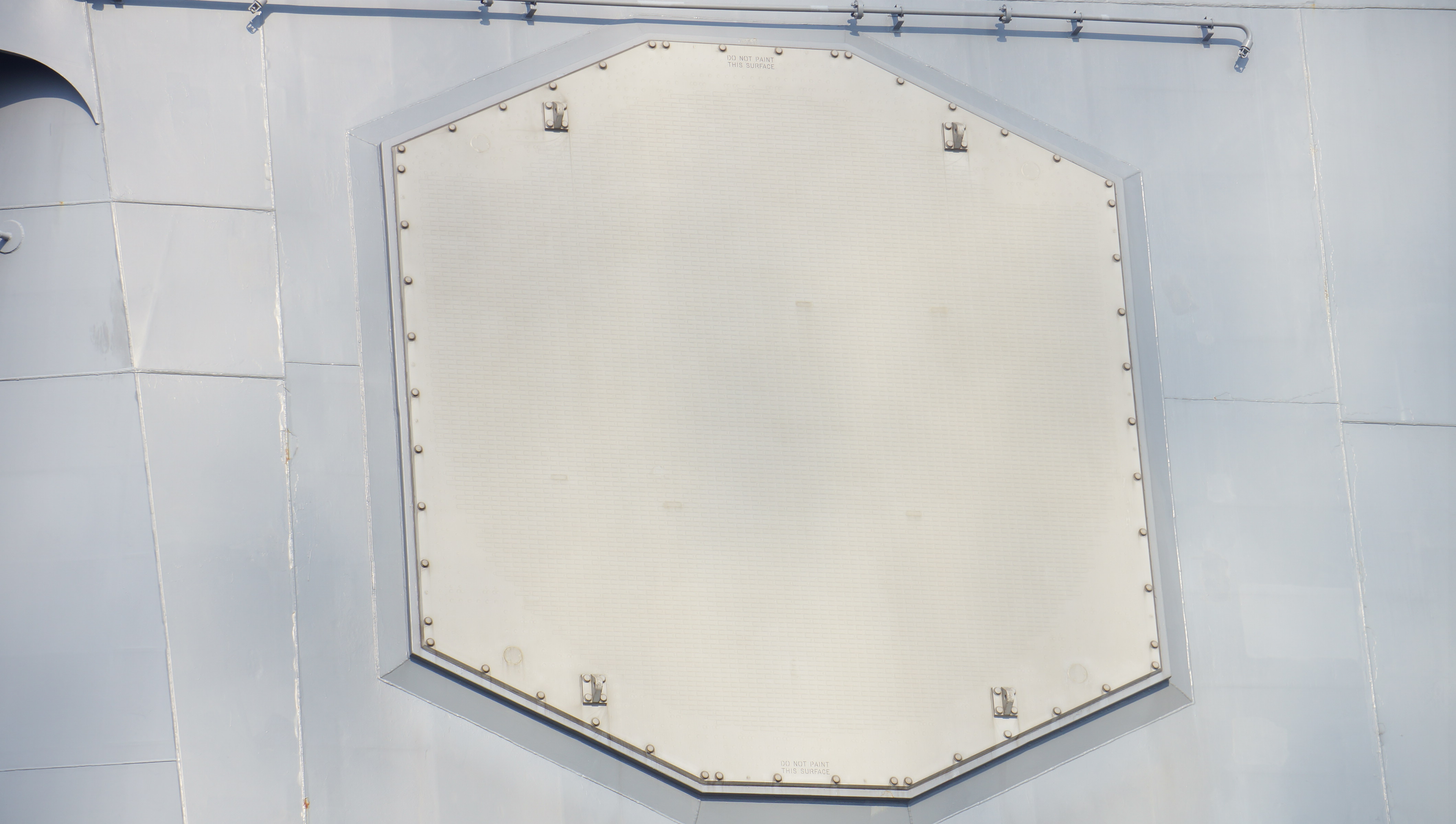 海上自衛隊 護衛艦あたご（DDG-177） 右舷前方側AN/SPY-1D（V）フェーズド・アレイ・レーダー。 14年4月26日 天保山埠頭にて。